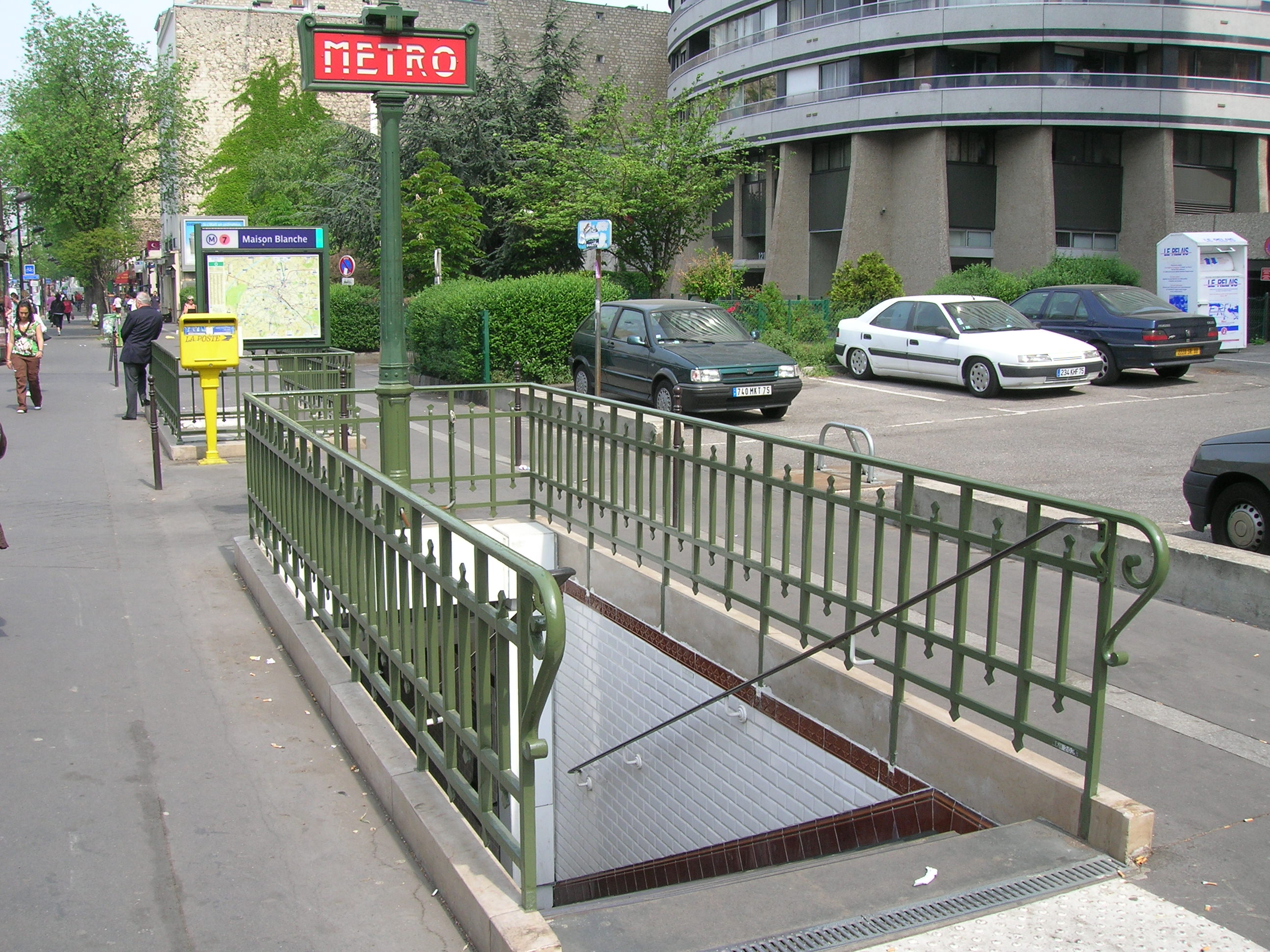 Accès de la station Maison Blanche ligne 7, Paris